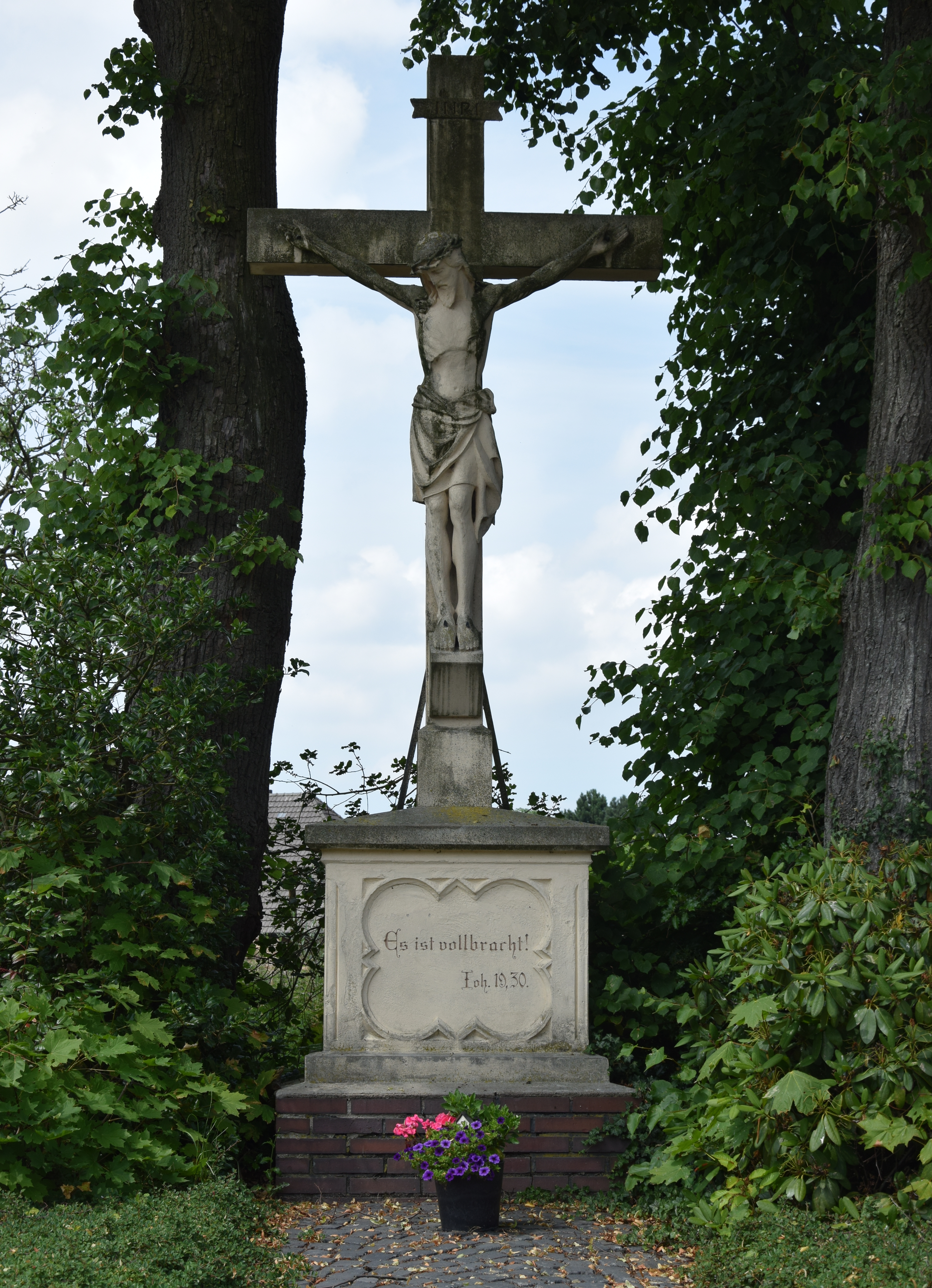 Denkmalgeschütztes Wegekreuz in Südlohng